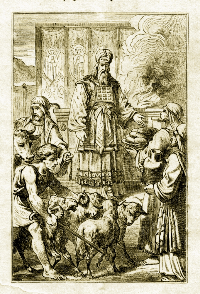 "Kapłaństwo Izraelitów w Przybytku Przymierza". Rycinia ze schrobenhausenowskiego warsztatu Carla Poellath